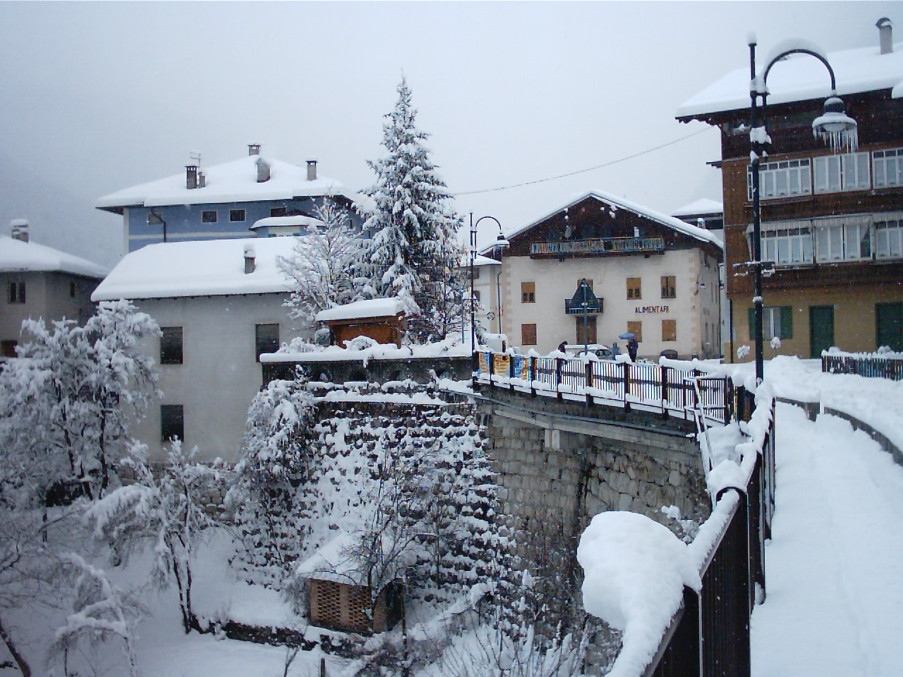 Piazza Vittorio Emanuele di Canal San Bovo (provincia di Trento) il 30 dicembre 2005